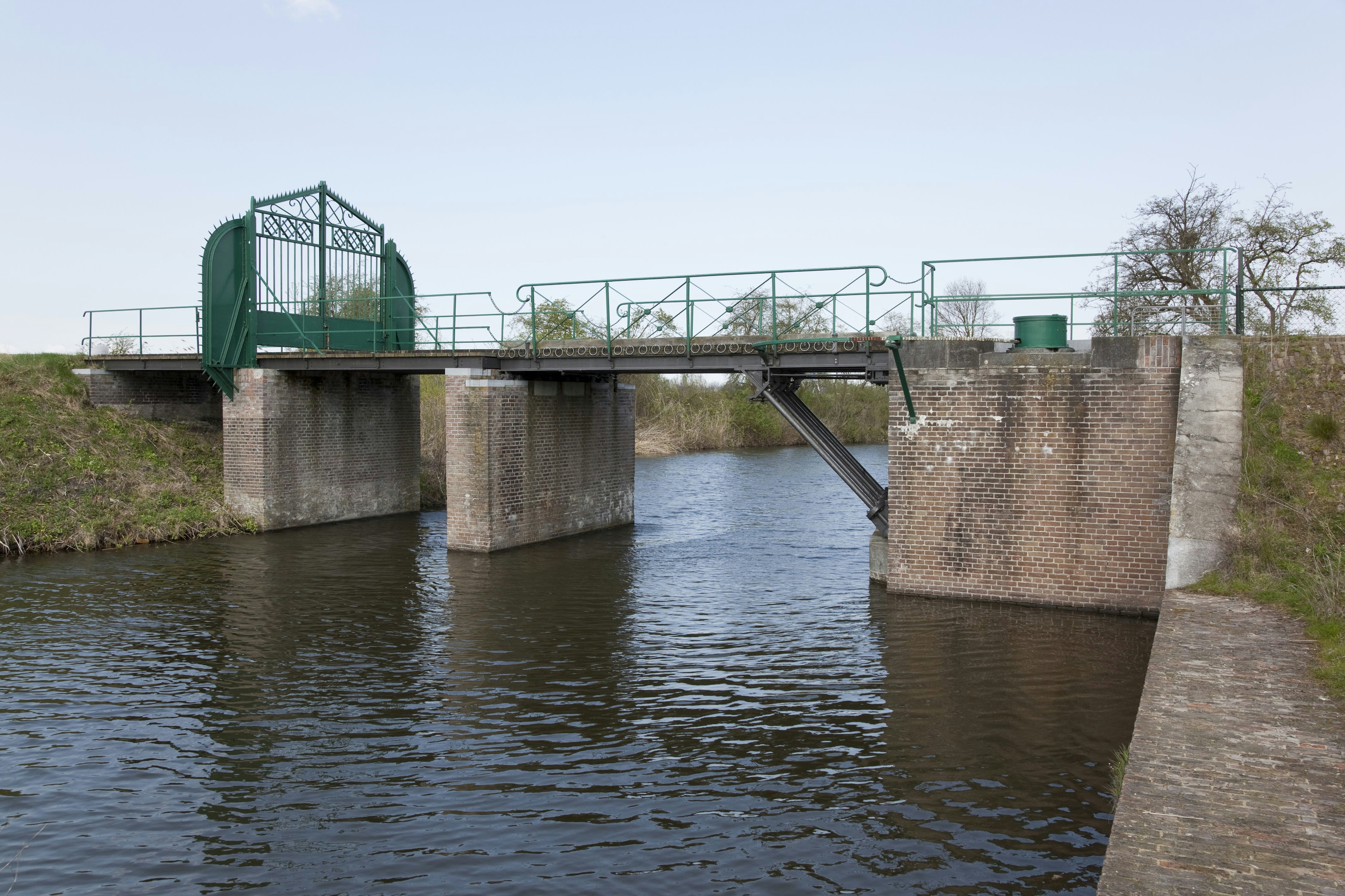 Fort Ronduit: Fort Ronduit (opmerking: Nieuwe Hollandse Waterlinie / Cluster 07)